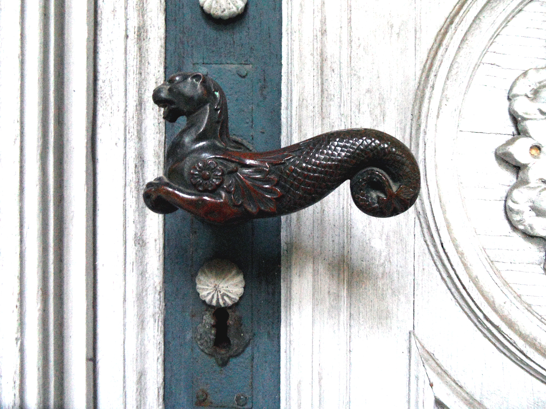 Türgriff am Portal des vormaligen Mausoleums der Fam. von Eickstedt (seit 1897 Dorfkirche Koblentz) Datum: 19.08.2011 Urheber: onnola (Flickr-User) Quelle